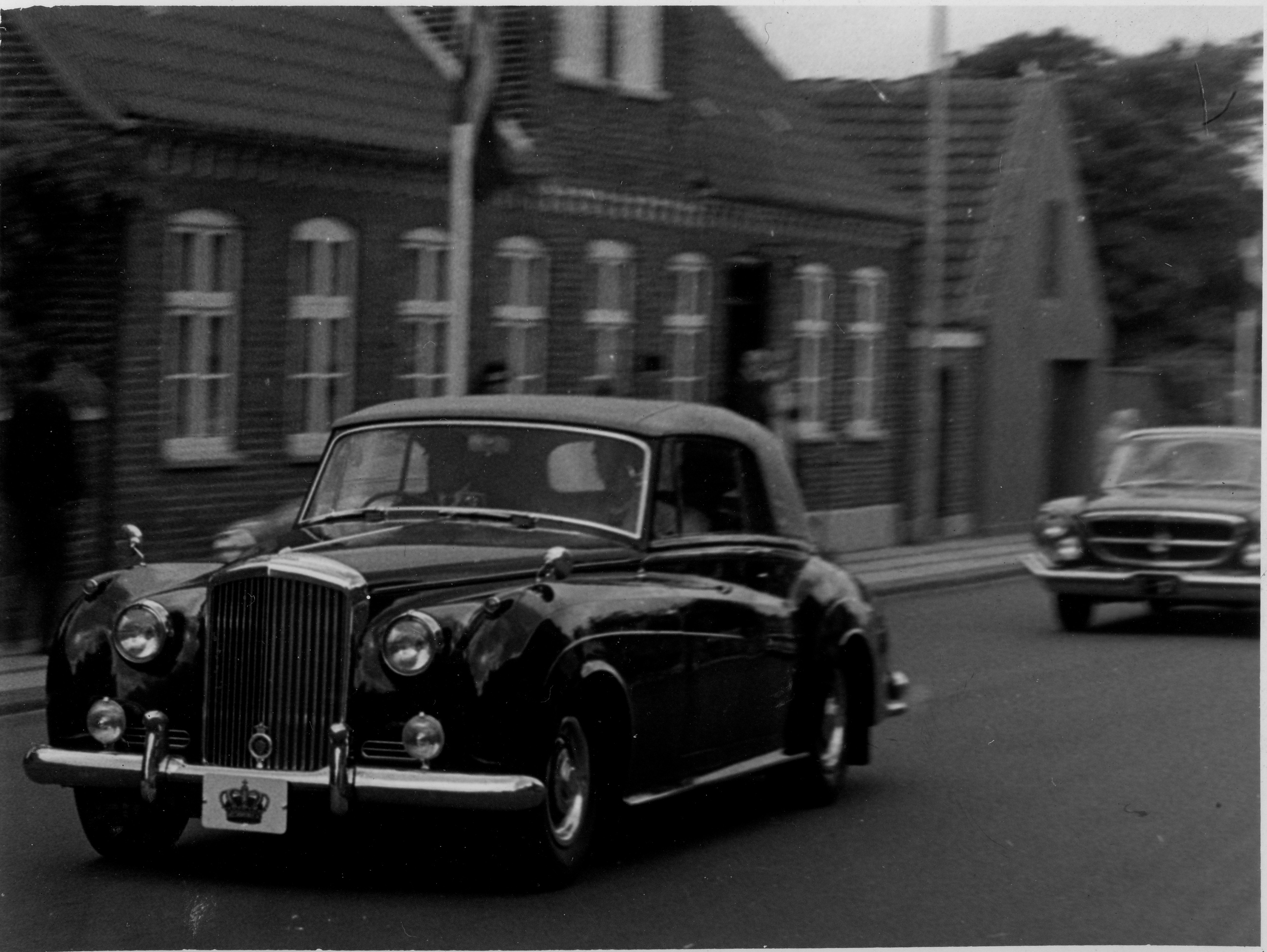 Bentley convertible owned by Frederik 9. of Denmark (probably he is inside). The license plate with the big crown is called "Store Krone" and the car has an alternative license plate: M461. It is taken somewhere in Jylland, Denmark around 1964-1968. Probably in Ringkøbing or Hvide Sande